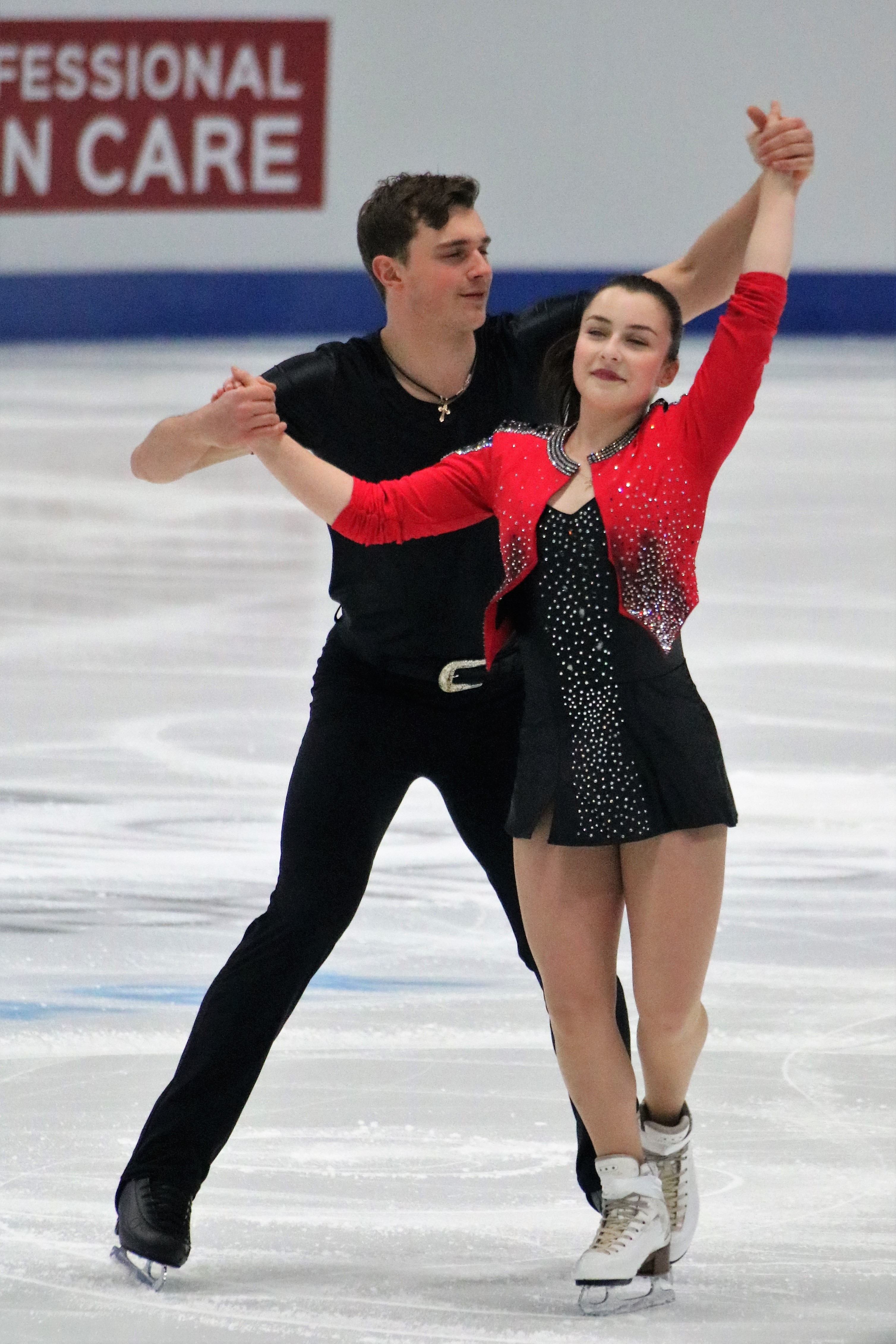 Дарья Данилова и Мишель Цыба (Нидерланды) на чемпионате Европы по фигурному катанию 2020